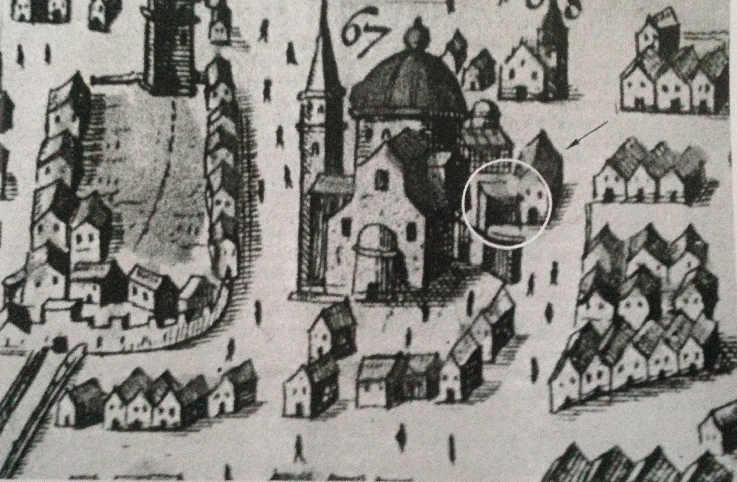 Rappresentazione